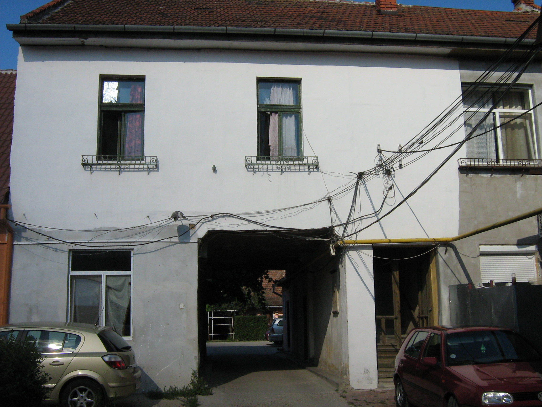 Kós Károly szülöháza